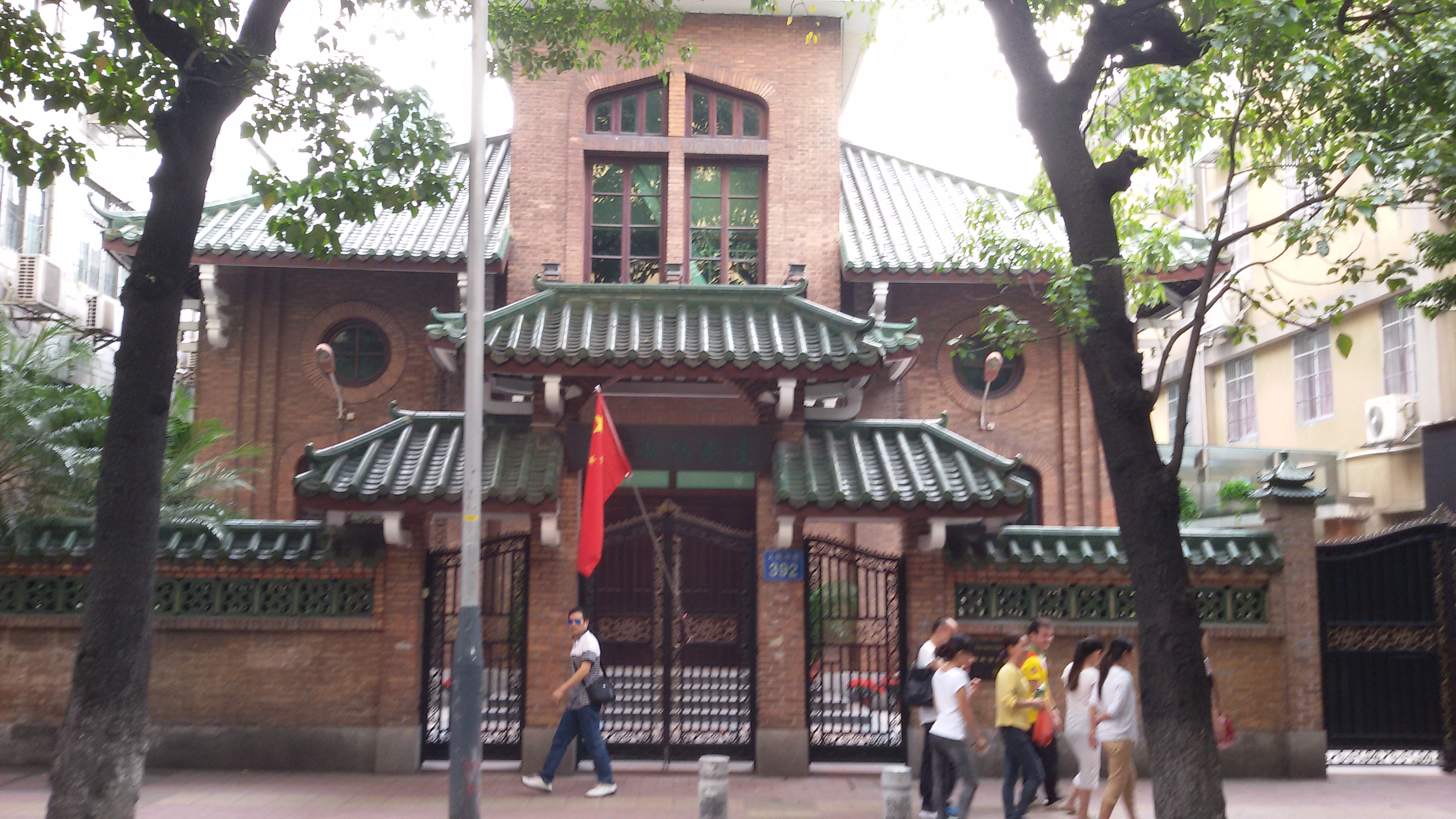 粵語: 錫安堂